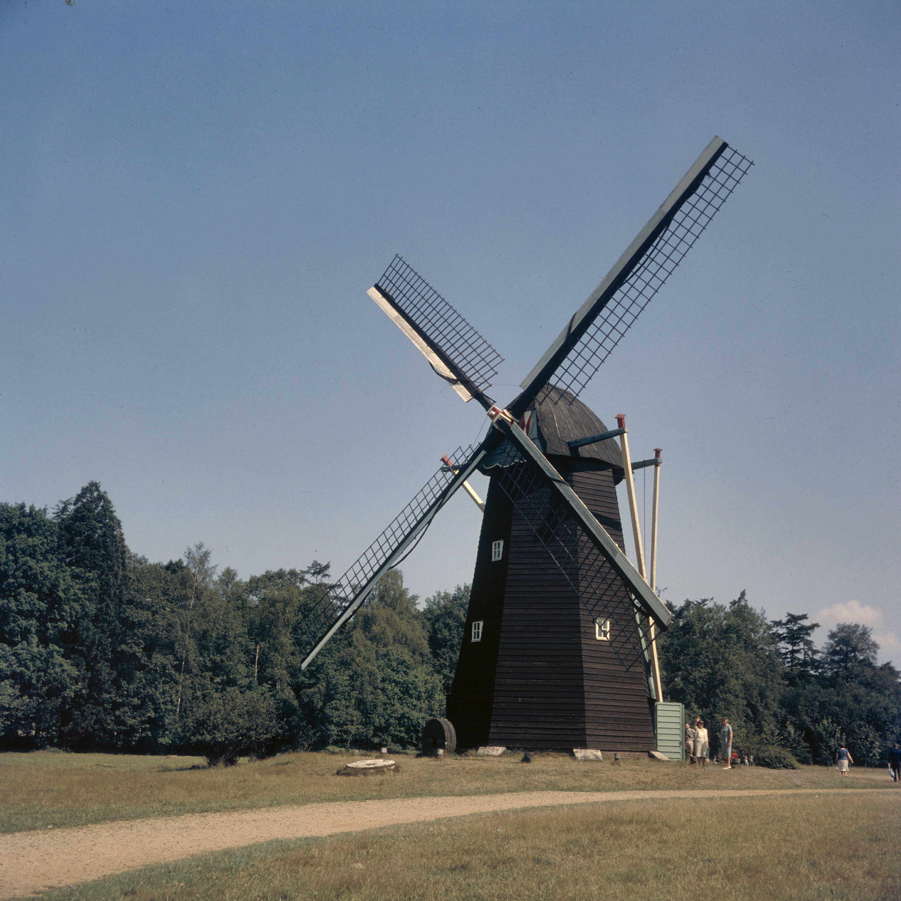 Galgemmolen, in 1954 overgebracht naar het Openluchtmuseum te Bokrijk, Genk, afkomsig uit Schulen ( Haspengouw ) (opmerking: Diacollectie Molens)